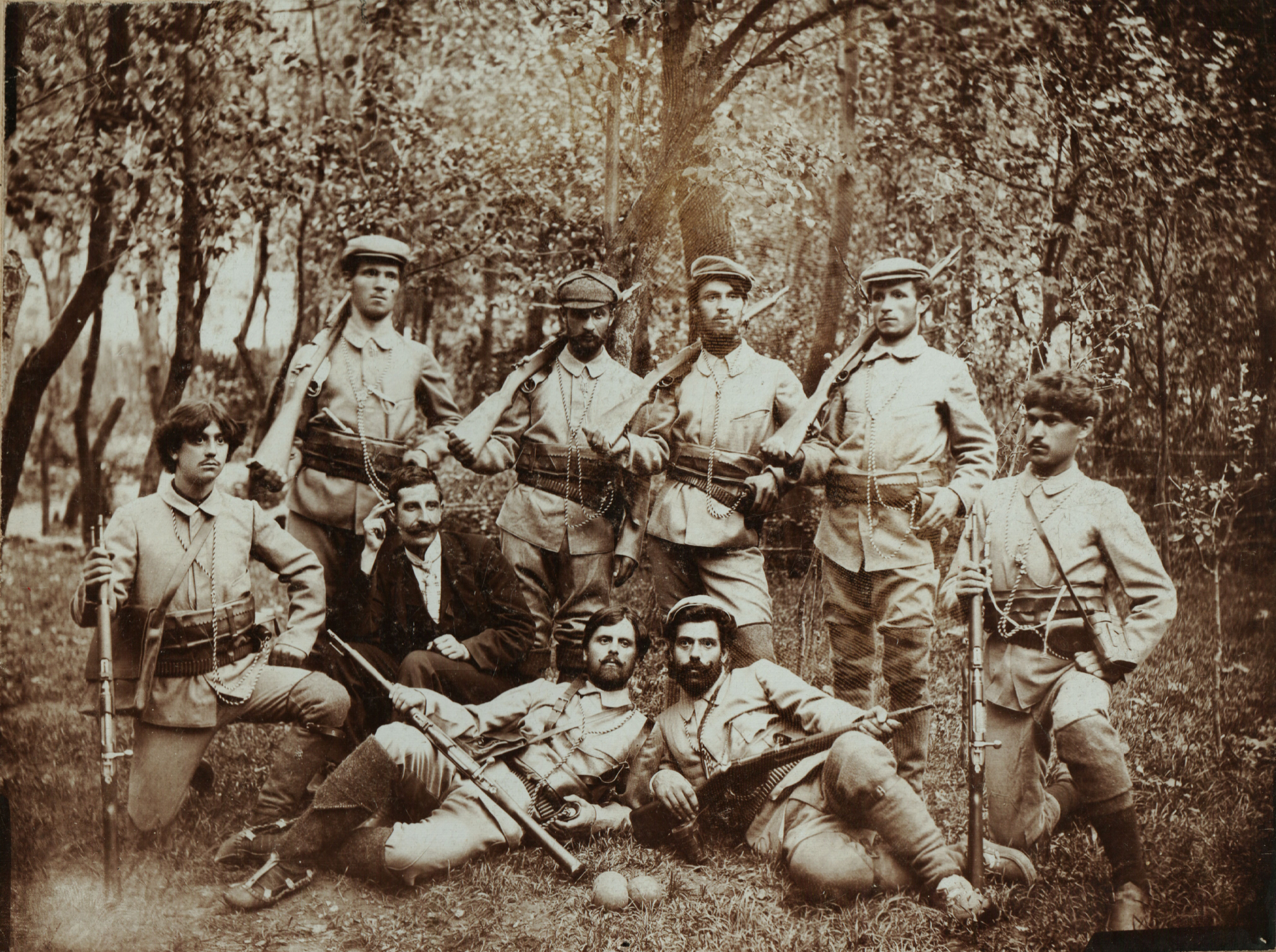 Снимка на четата наГеорги Мучитани и Александър Кошка